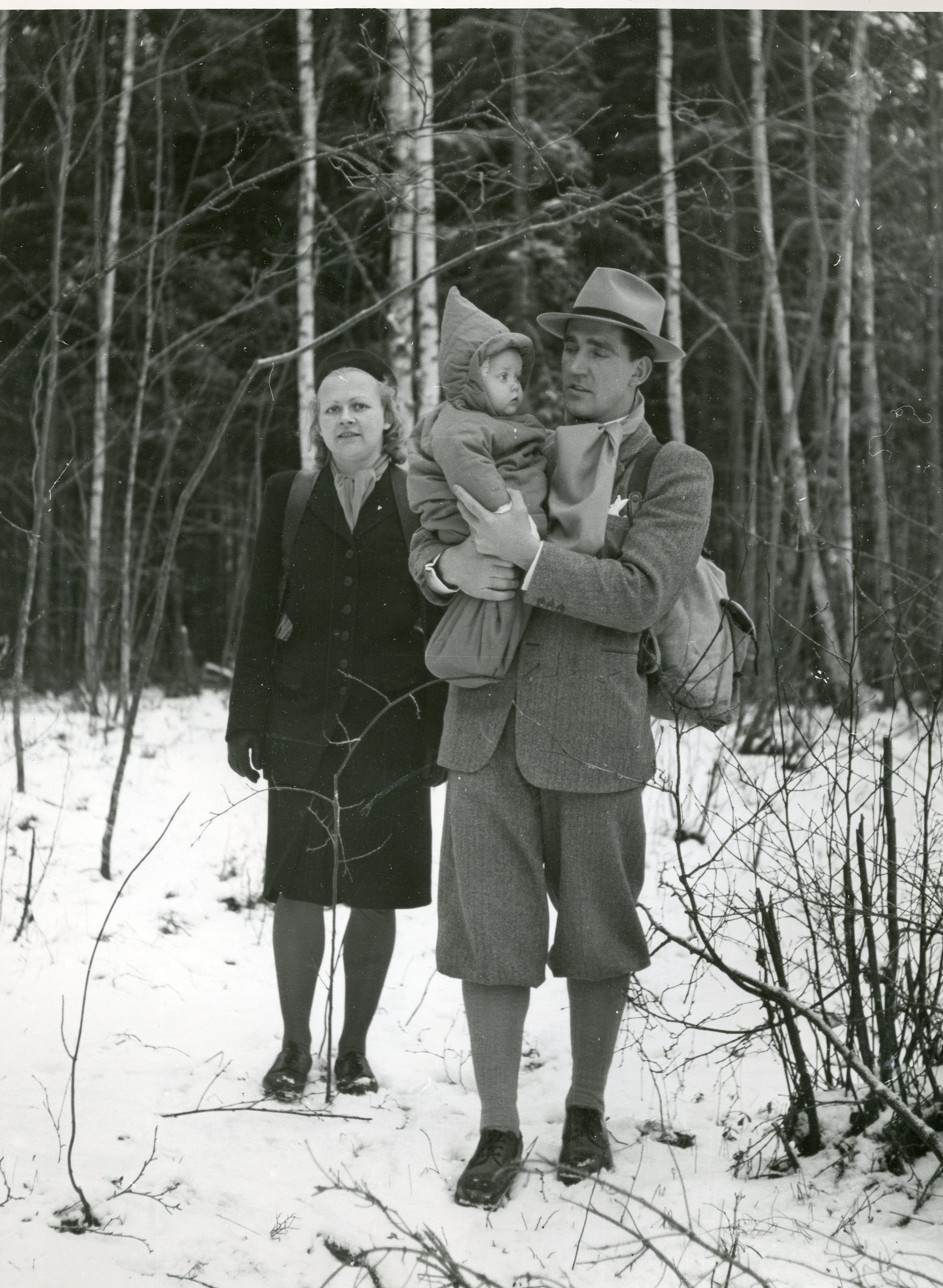 I en stadig økende strøm har nordmenn siden 1940 tatt seg over grensen fra Norge til Sverige, -fra nazistisk forfølgelse og terrortrussel i det okkuperte hjemland. Gjennom skog og over fjell har ferden gått, under slit og hårde strabaser for mange. Bildet viser et norsk ektepar med sitt lille barn på marsj mot grensen. RA/PA-1209/Uc/68/4/Uten nummer